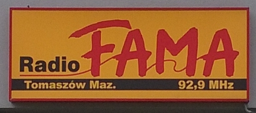 Neon Radia FAMA na wejściem do redakcji w Tomaszowie Mazowieckim w województwie łódzkim